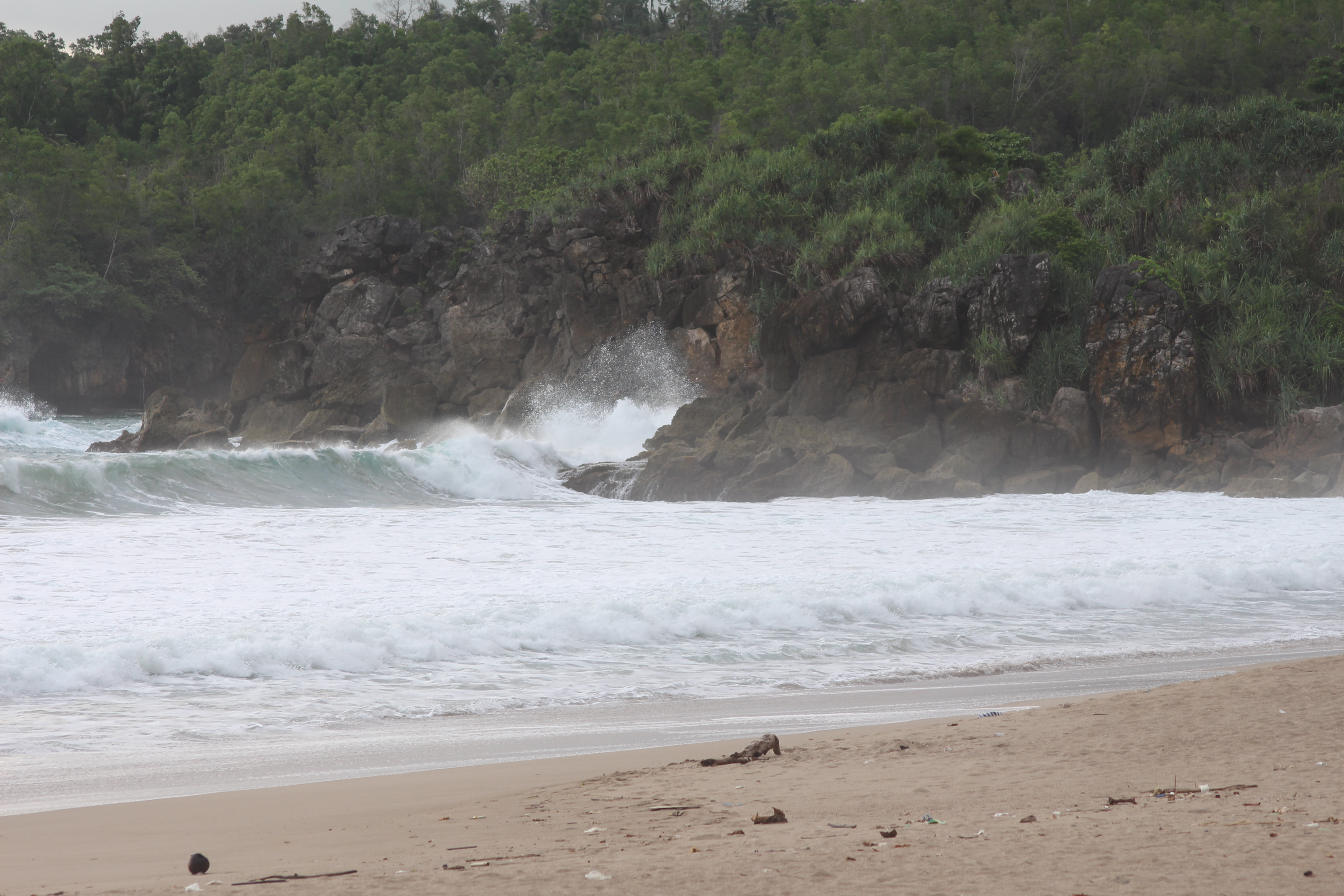 Pecahan Ombak